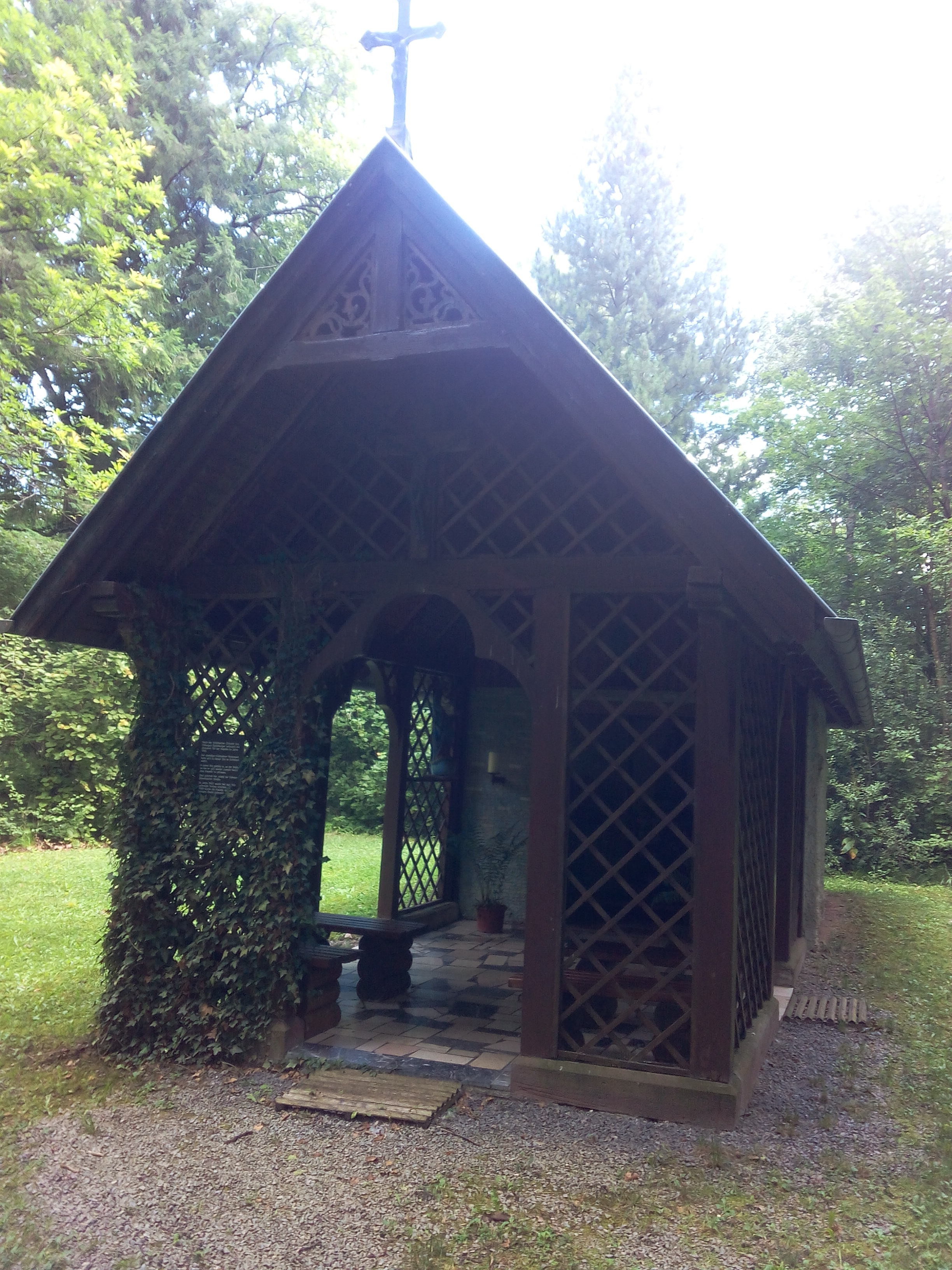 Eingangsbereich